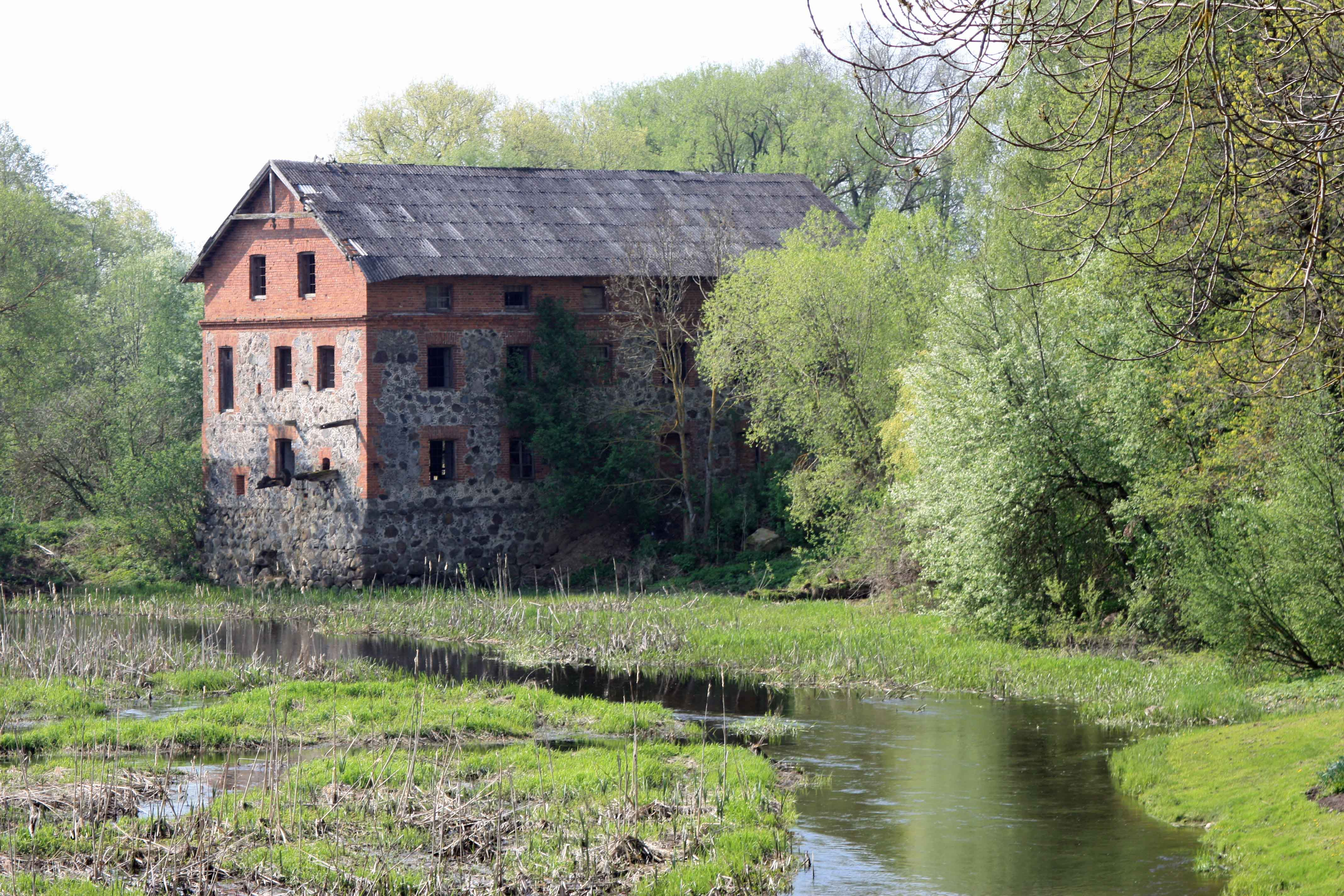 Toliūnų dvaro vandens malūnas, Toliūnai, Pasvalio rajonas.